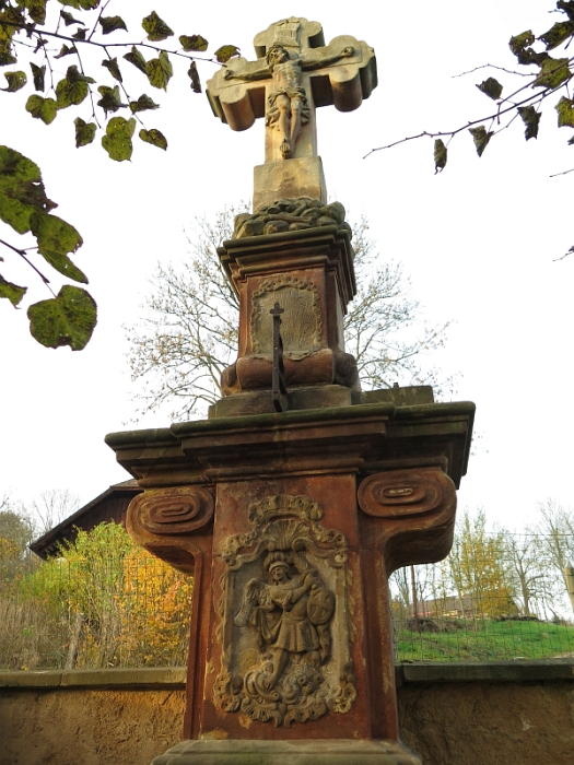 Kalvárie / svatého Vavřince a Donáta, okraj obce, směr na Bystřici, Sedliště (okres Jičín).